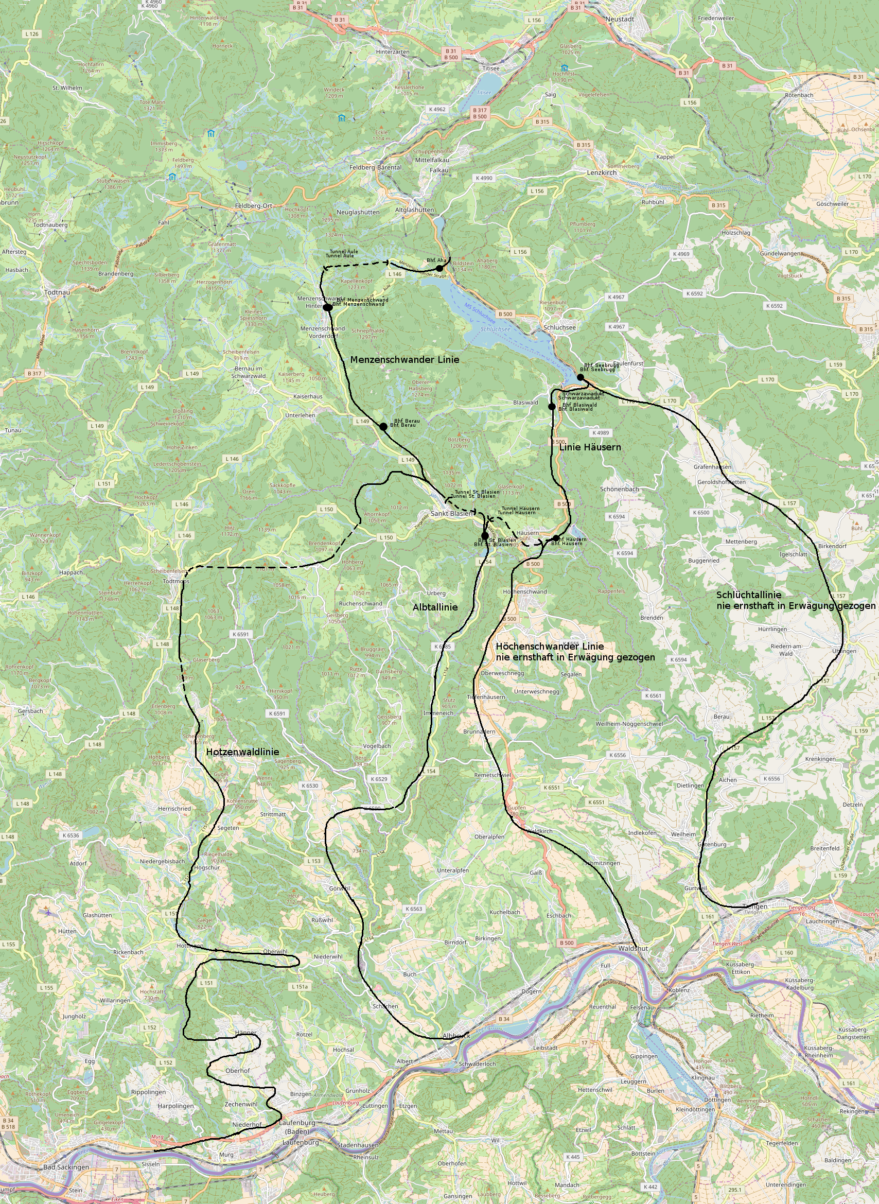 Geplante Eisenbahnlinien von St. Blasien an den Hochrhein (Hotzenwaldbahn, Albtalbahn(en), Schlüchttalbahn) This map may be incomplete, and may contain errors. Don't rely solely on it for navigation.